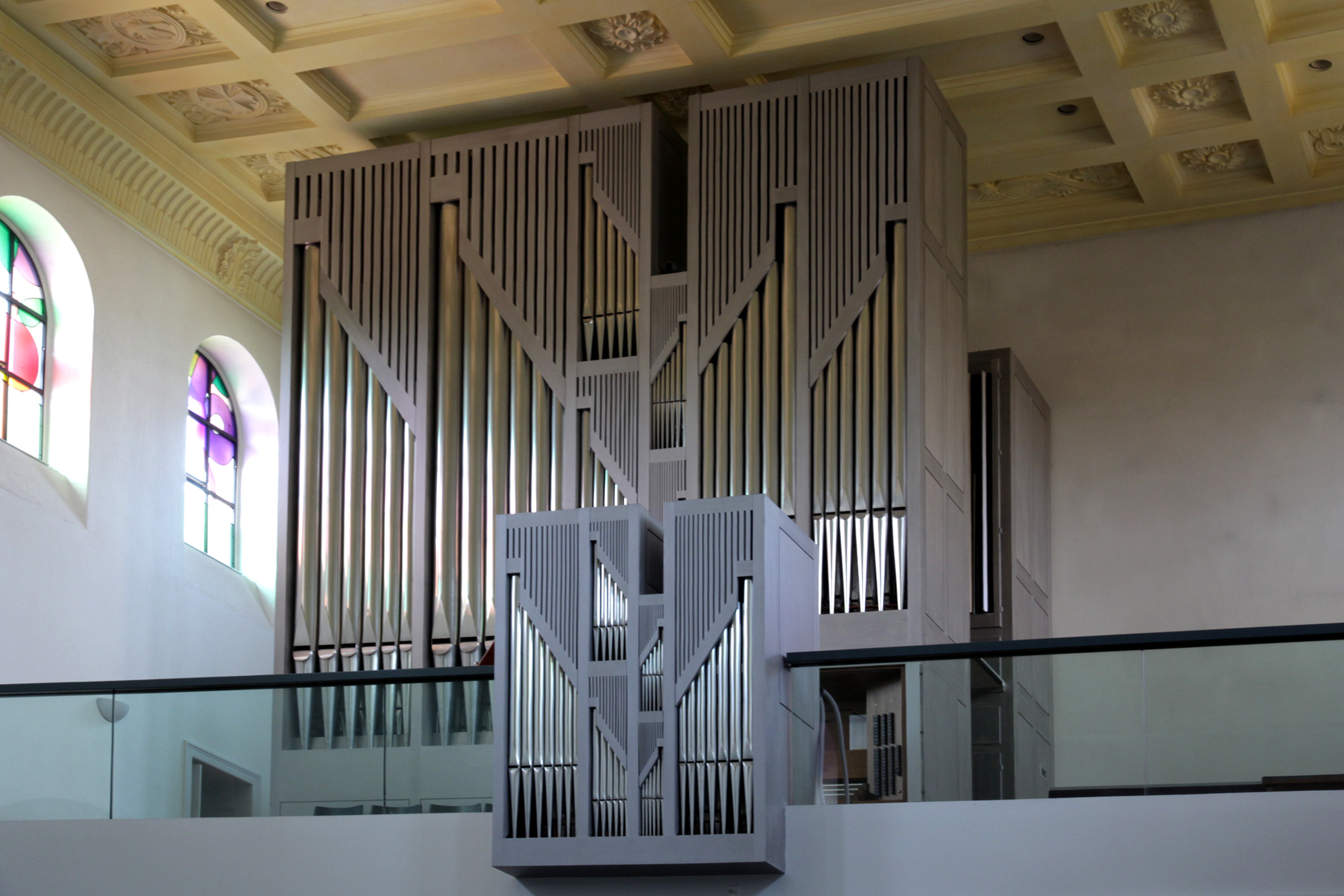 Römisch-katholische Kirche St. Franziskus, Zürich-Wollishofen